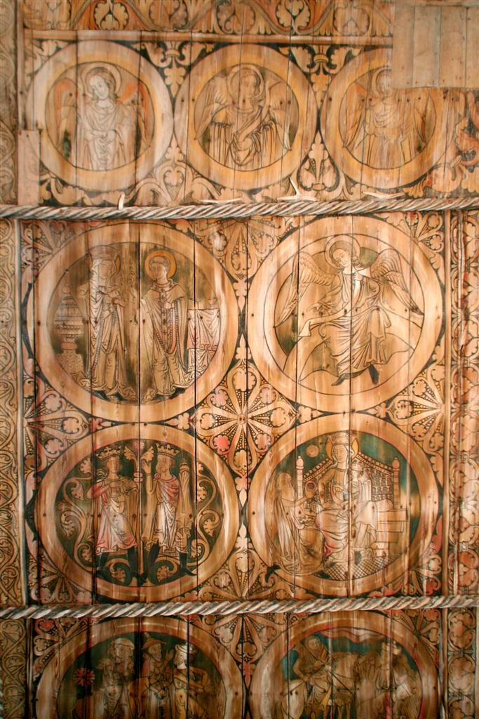 Foto: Tor Svensson